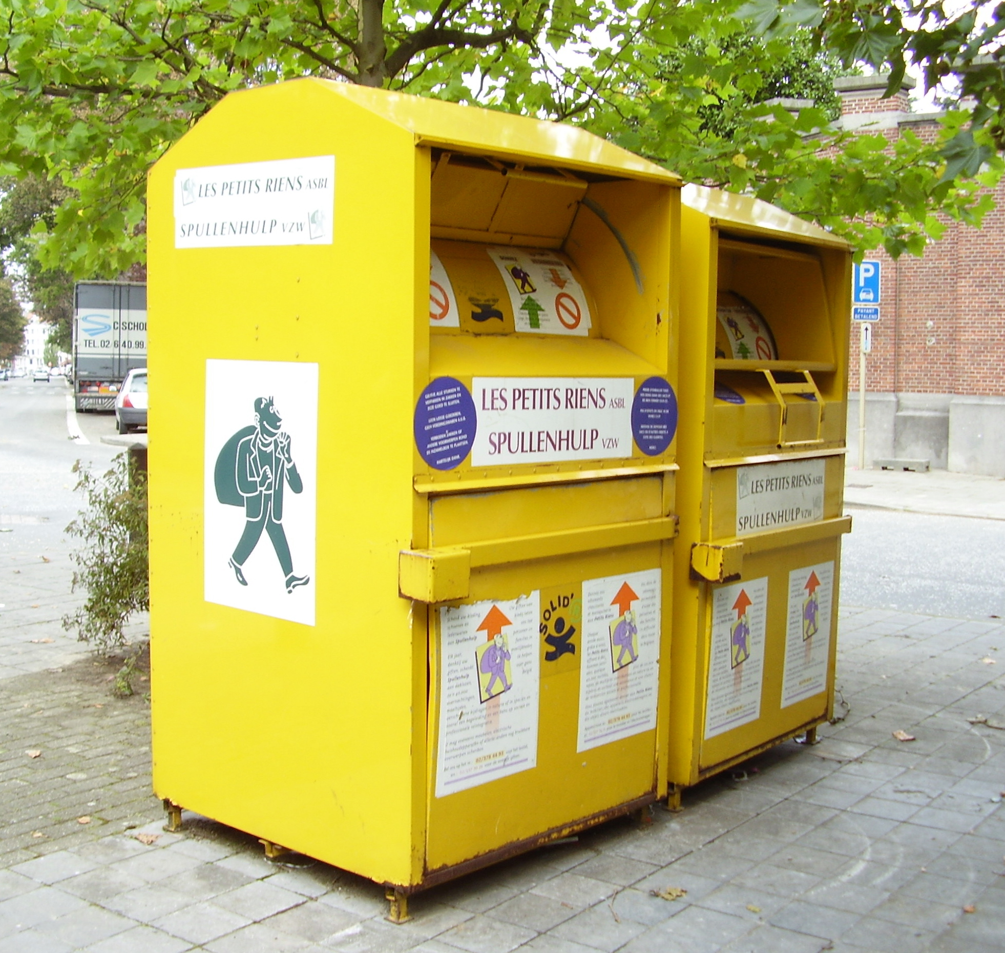 Description: Cabine de l'association "Les Petits riens" pour la récolte de vêtements réutilisables (Bruxelles - Belgique) Author: User:Ben2 Date of creation: 04 octobre 2006 Source: Photo personnelle